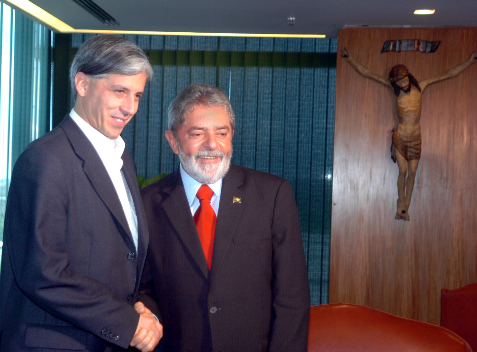 Álvaro García Linera, vice-president of Bolivia, with Luiz Inacio Lula da Silva, president of Brazil